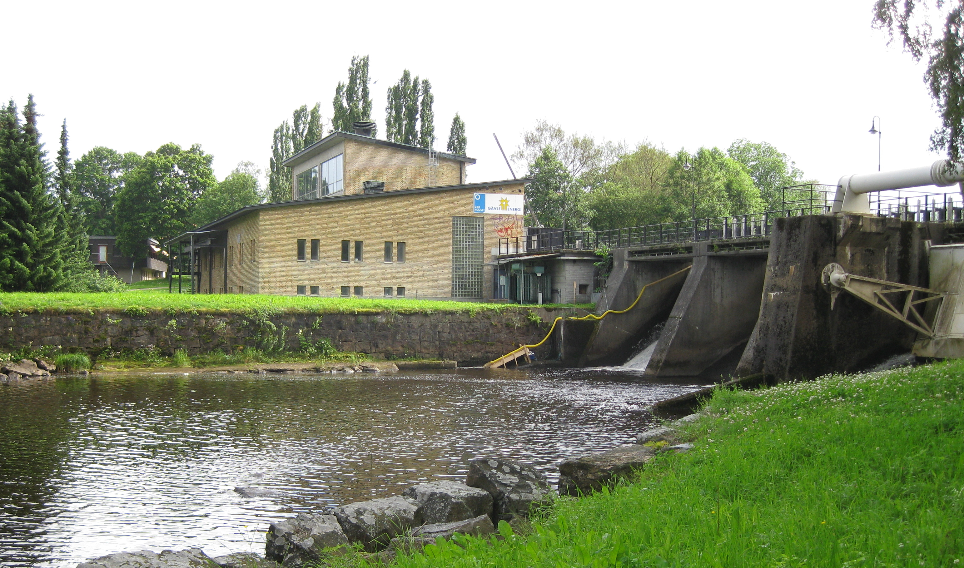 Strömdalens kraftverk i Gavleån